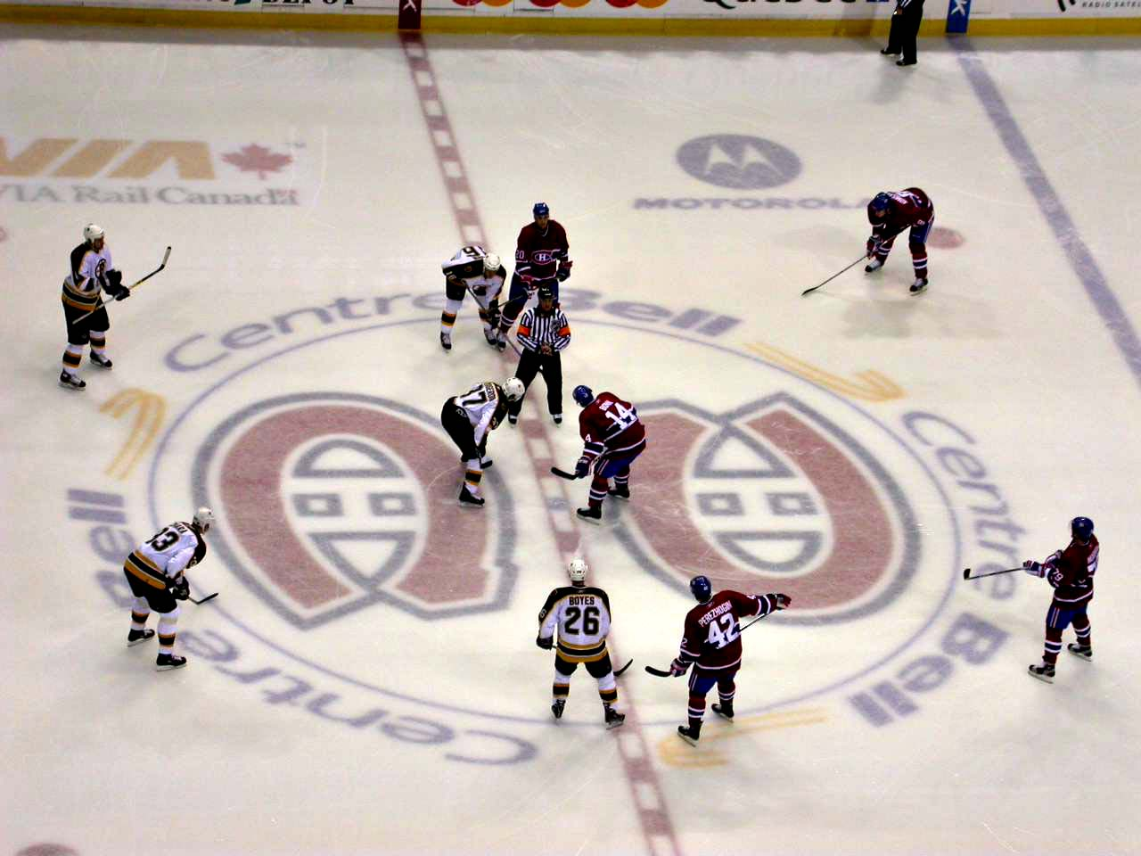 Canadien de Montréal affronte les Bruins de Boston au Centre Bell à Montréal